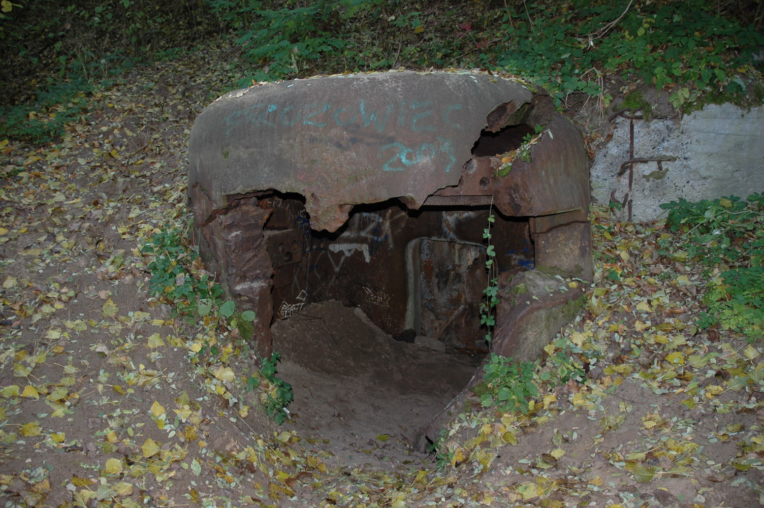 Der 3-Schartenturm 2 P7 von Panzerwerk 867